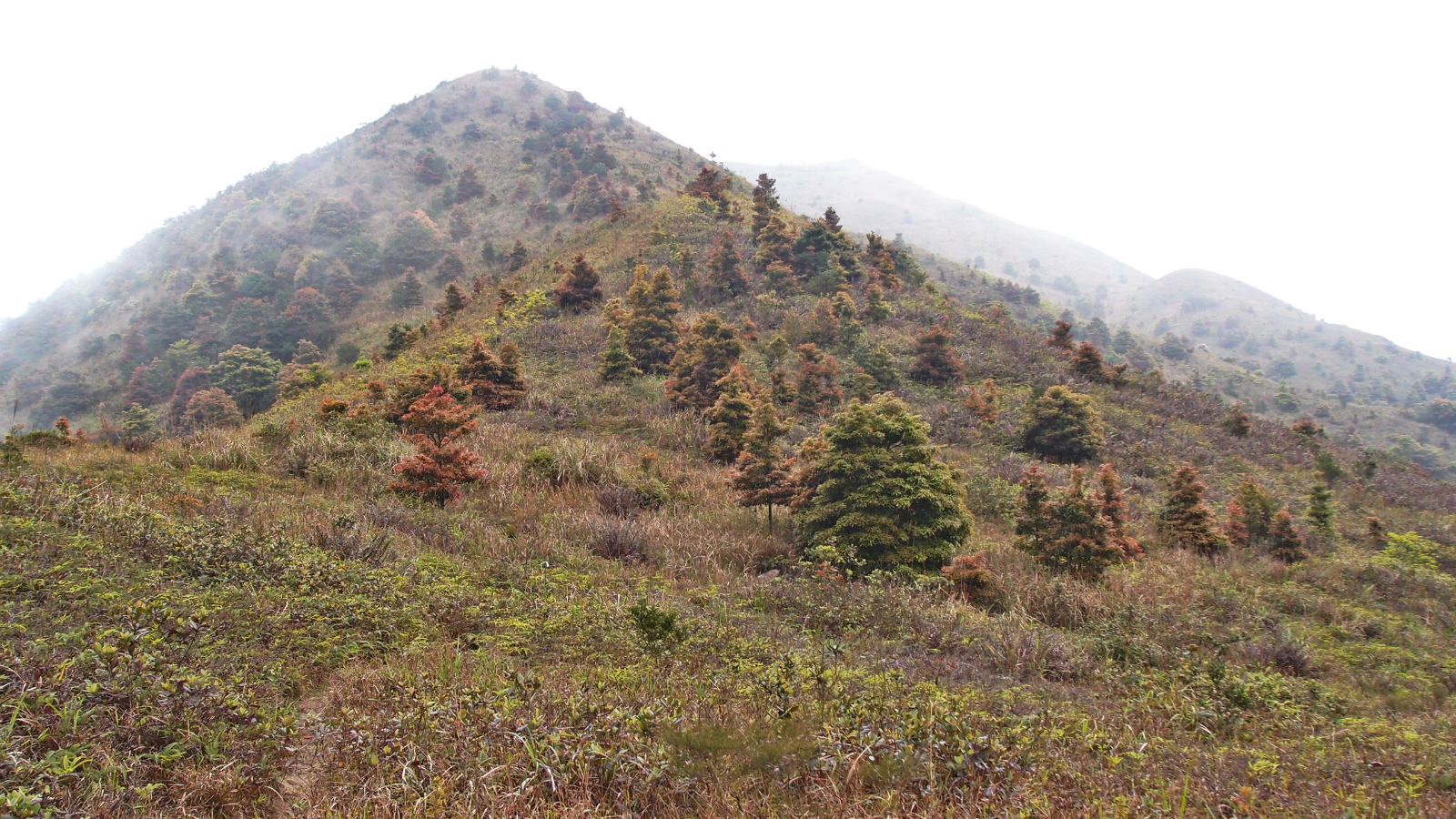 粵語: 彌勒山北脊，種有不少楠樹，春天時葉片為紅色